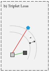 تابع هزینه سه گانه در شبکه تریپلت